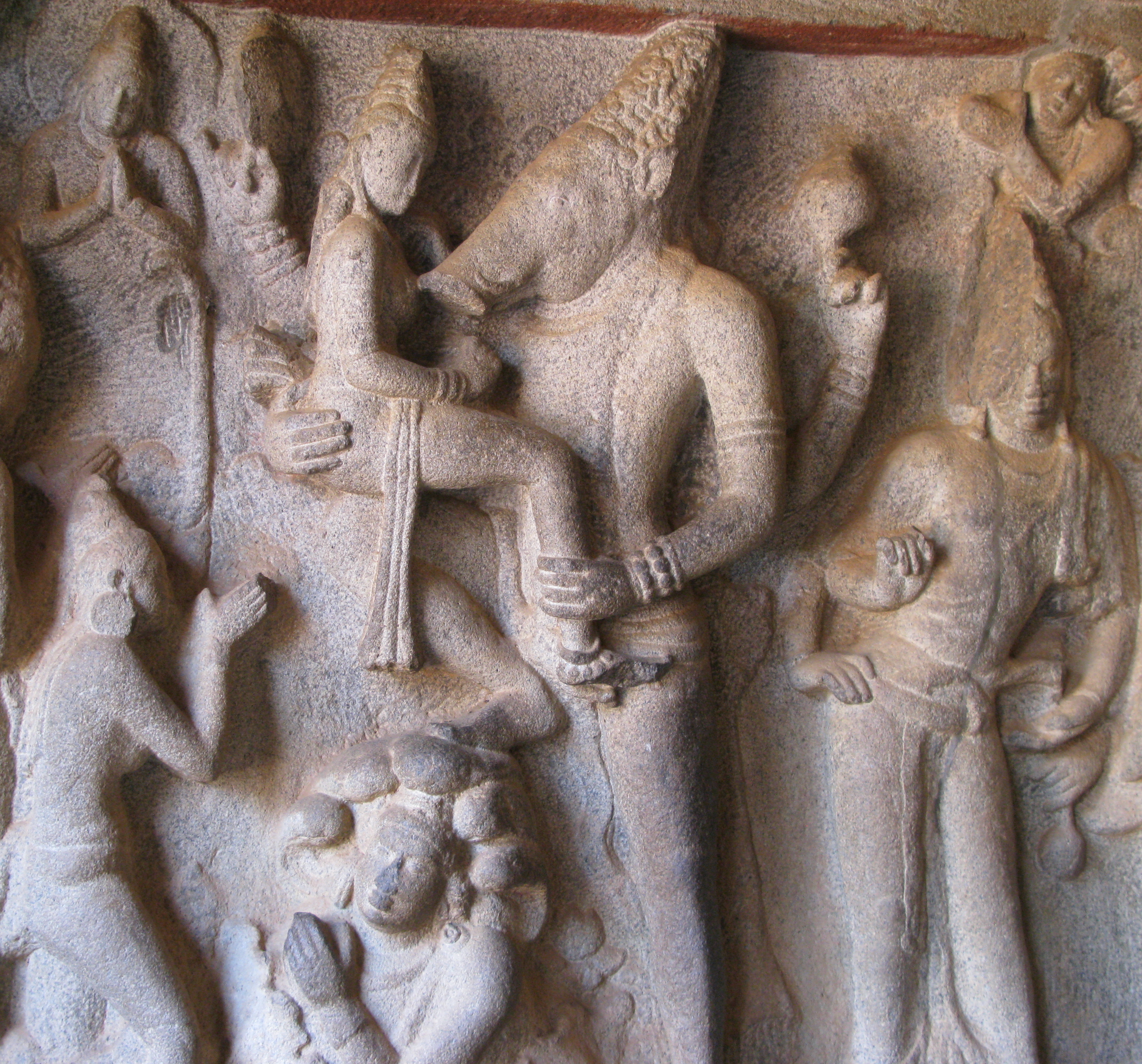 Mahabalipuram, Feb 2008